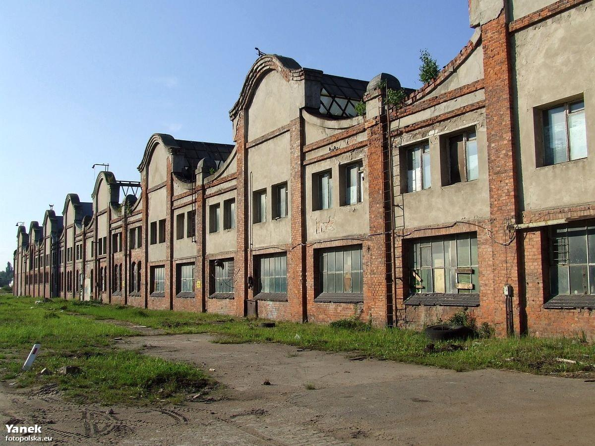 Hala wagonów południowa ściana Widok od wschodu